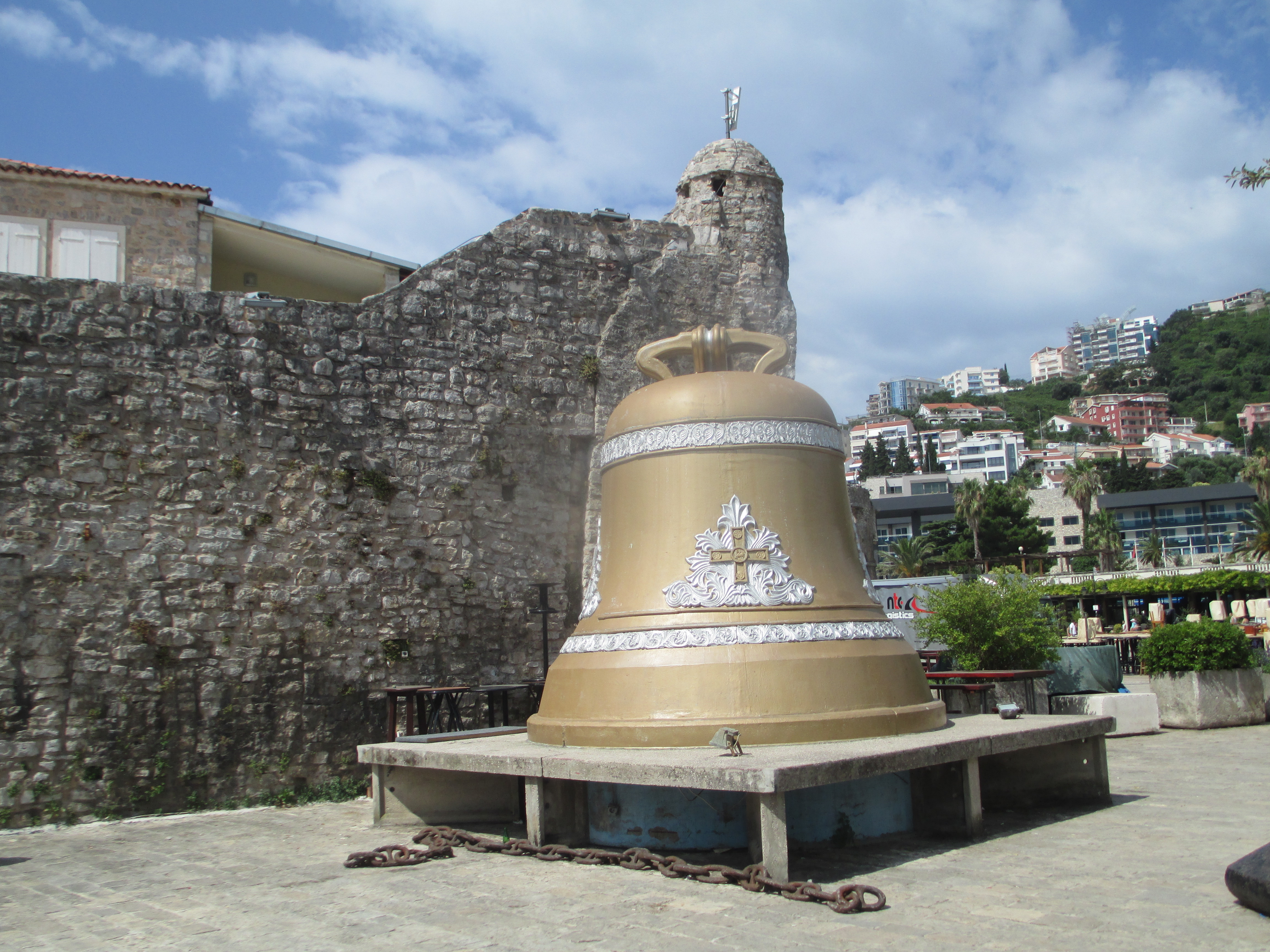 חומת בודבה